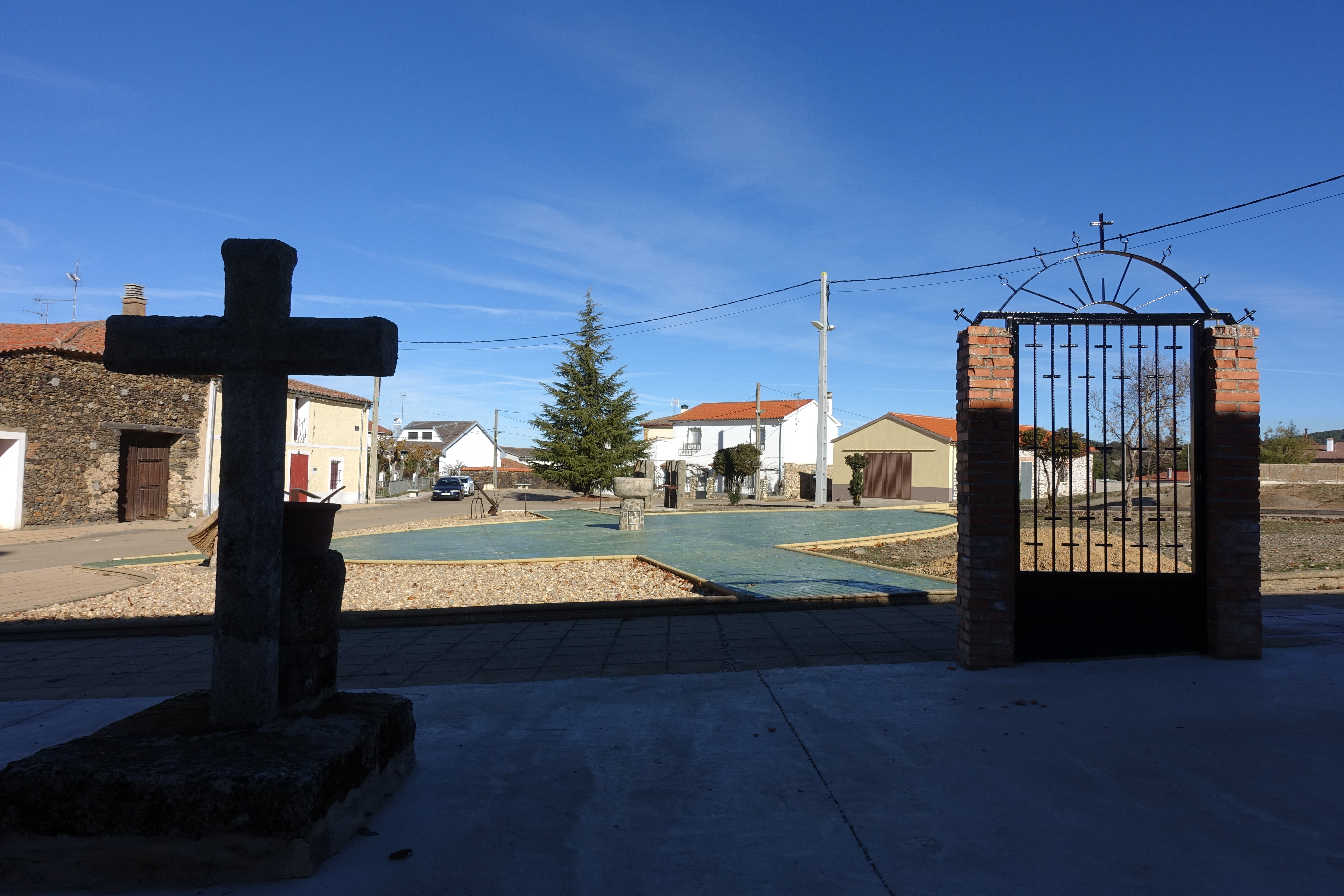 Plaza en Aldeanueva de la Sierra (Salamanca, España).